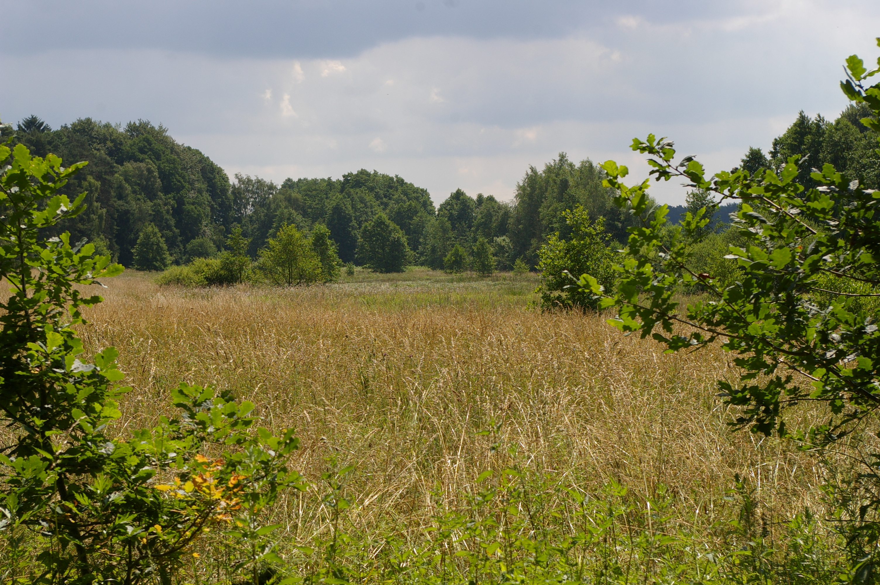 Das Naturschutzgebiet „Speckenbachtal“ nordöstlich von Borstel